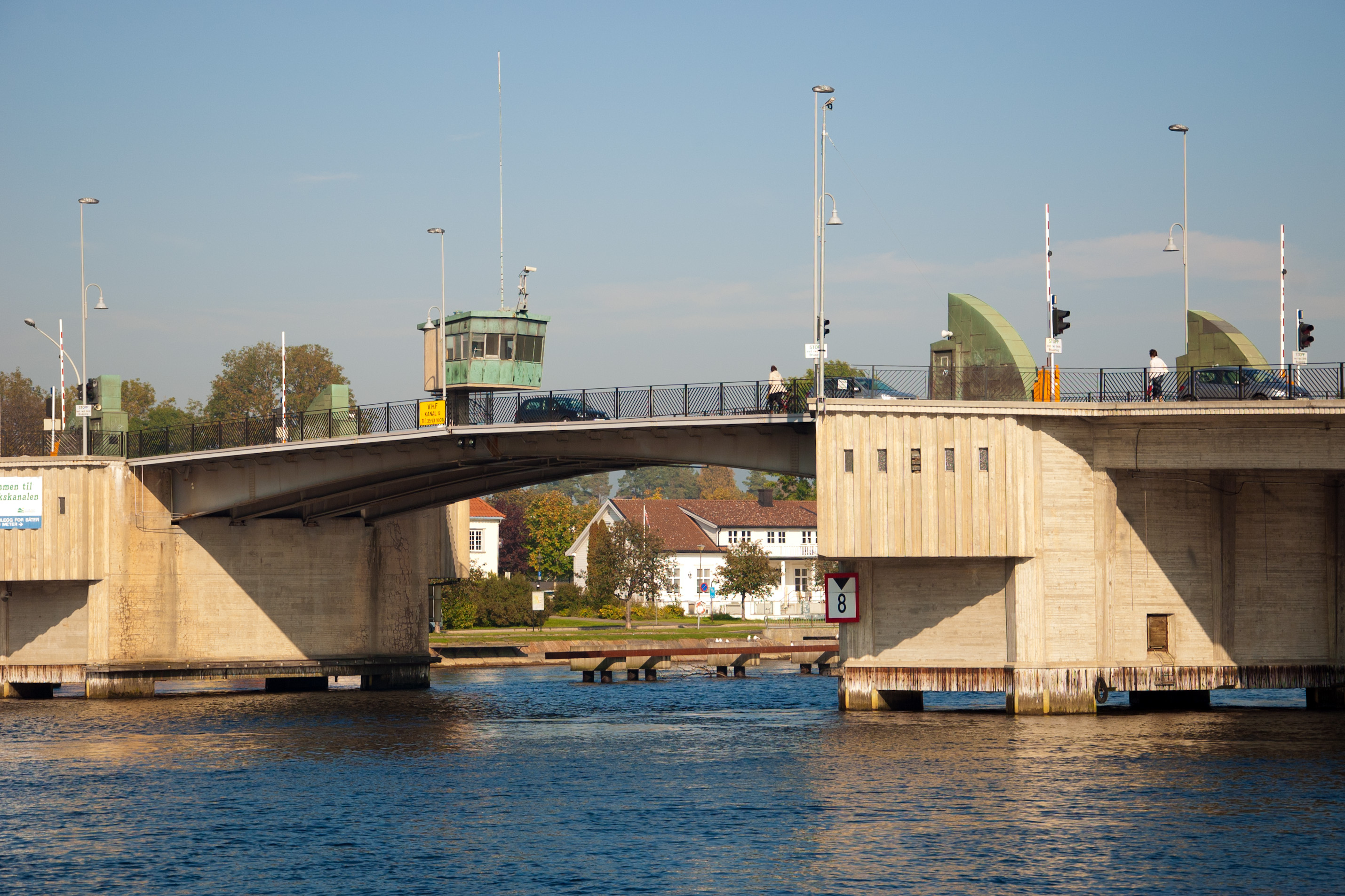 Porsgrunnsbrua på fylkesvei 356 i Porsgrunn, Telemark